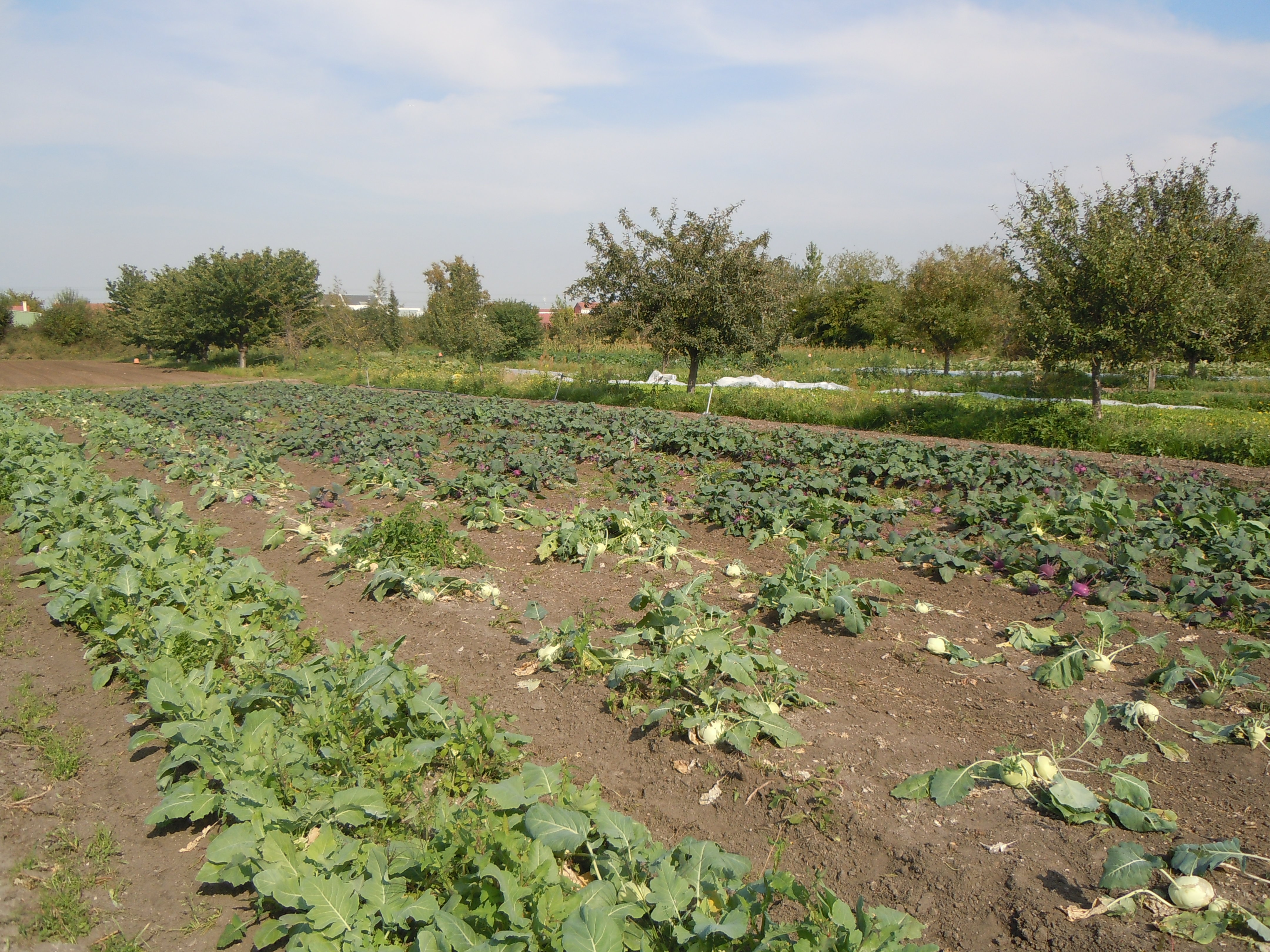 AMAP - Les jardins de Conflans - Conflans-Sainte-Honorine - Yvelines - France.